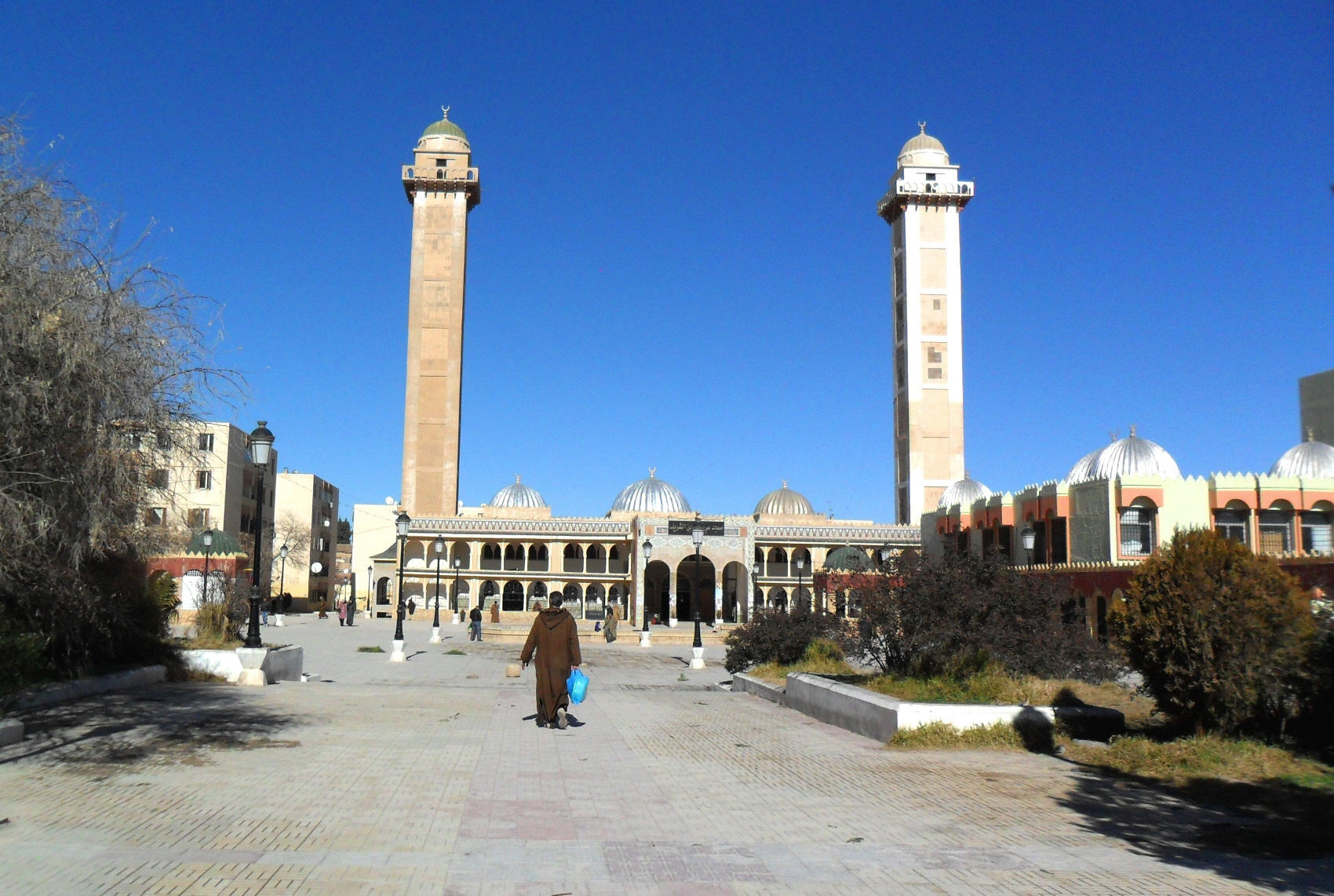 مسجد بن شريف